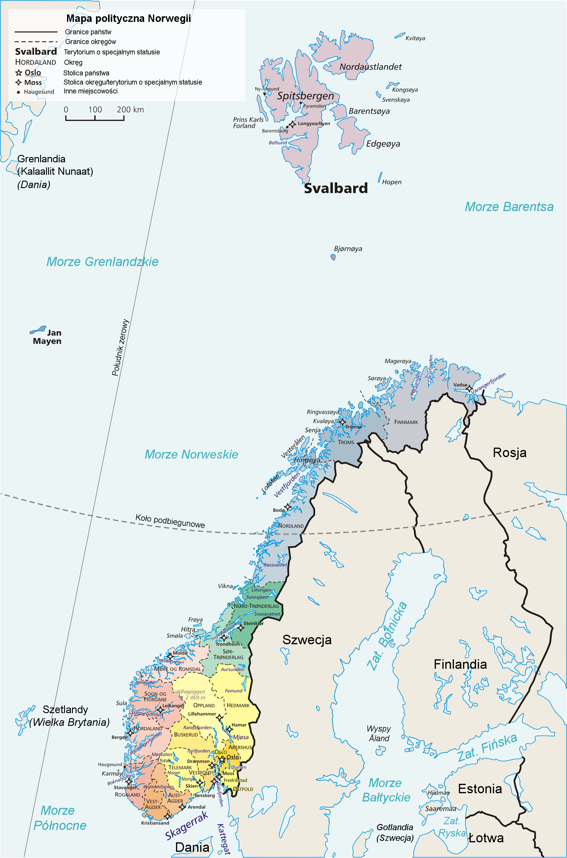 Mapa polityczna Norwegii na podst.